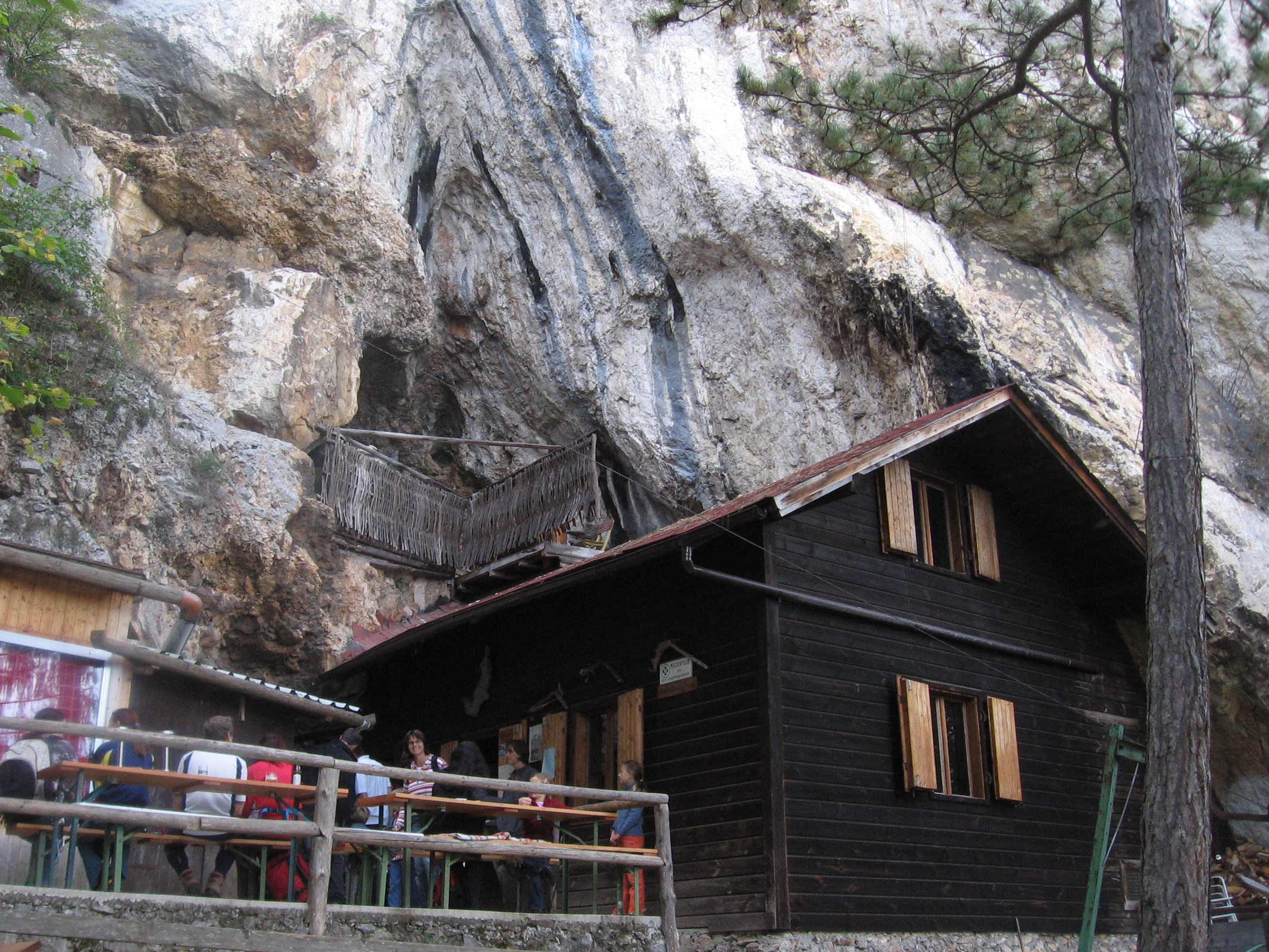 Einhornhöhle (Österreich)